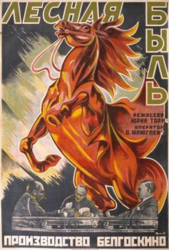 Беларуская (тарашкевіца): Афіша фільму "Лясная быль"